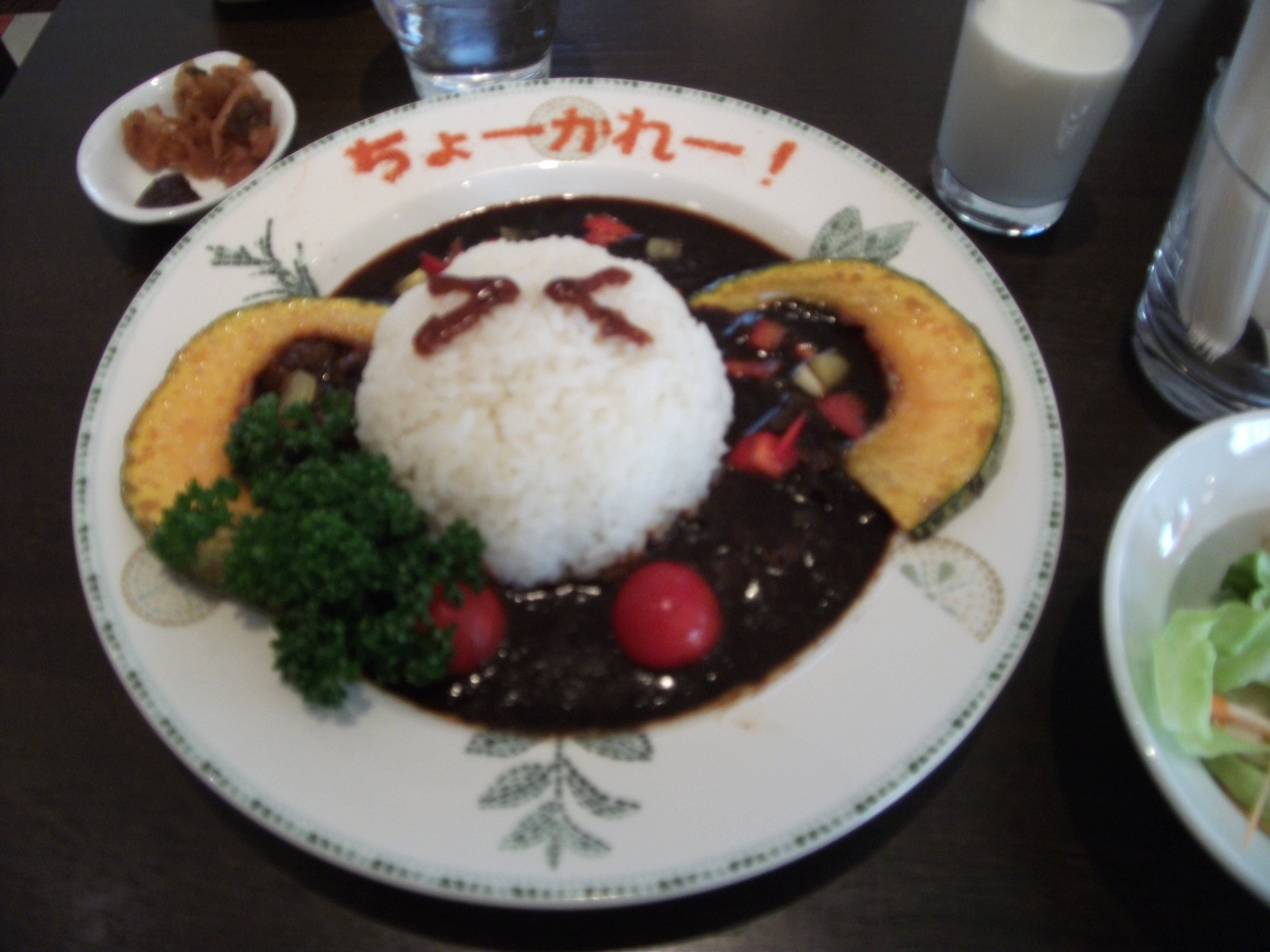 のりえたんの激辛テンションMAXカレー